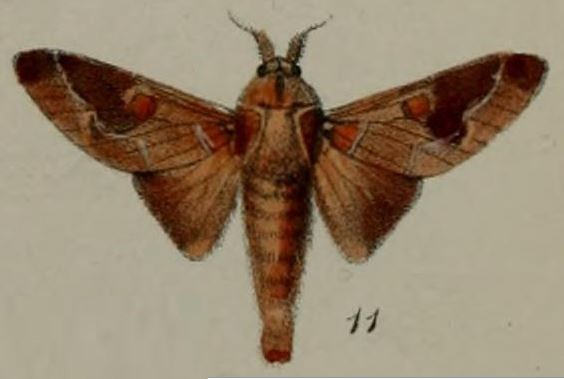 Streblote polydora (Druce, 1887)